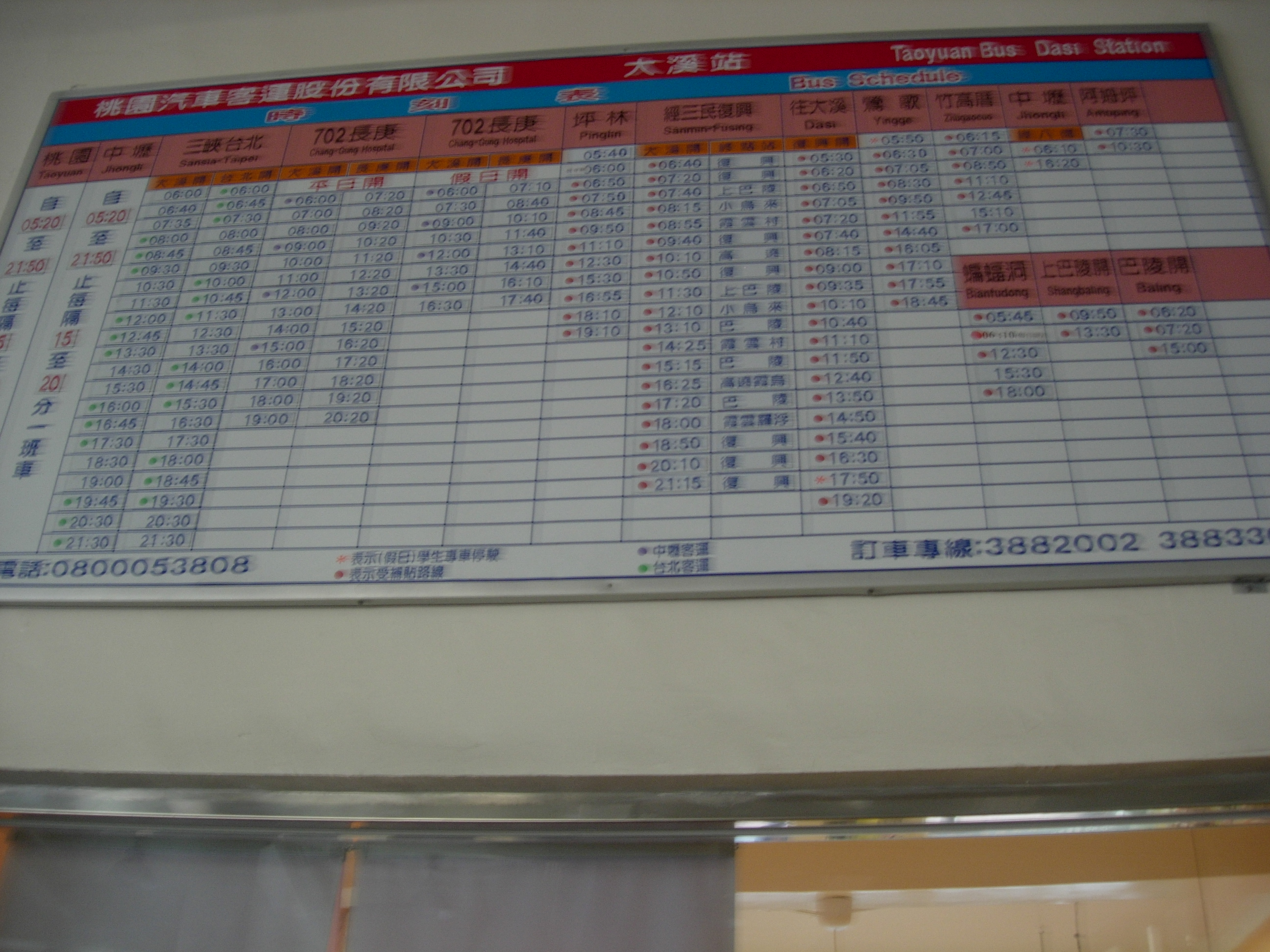 中文（台灣）: 桃園客運大溪站時刻表